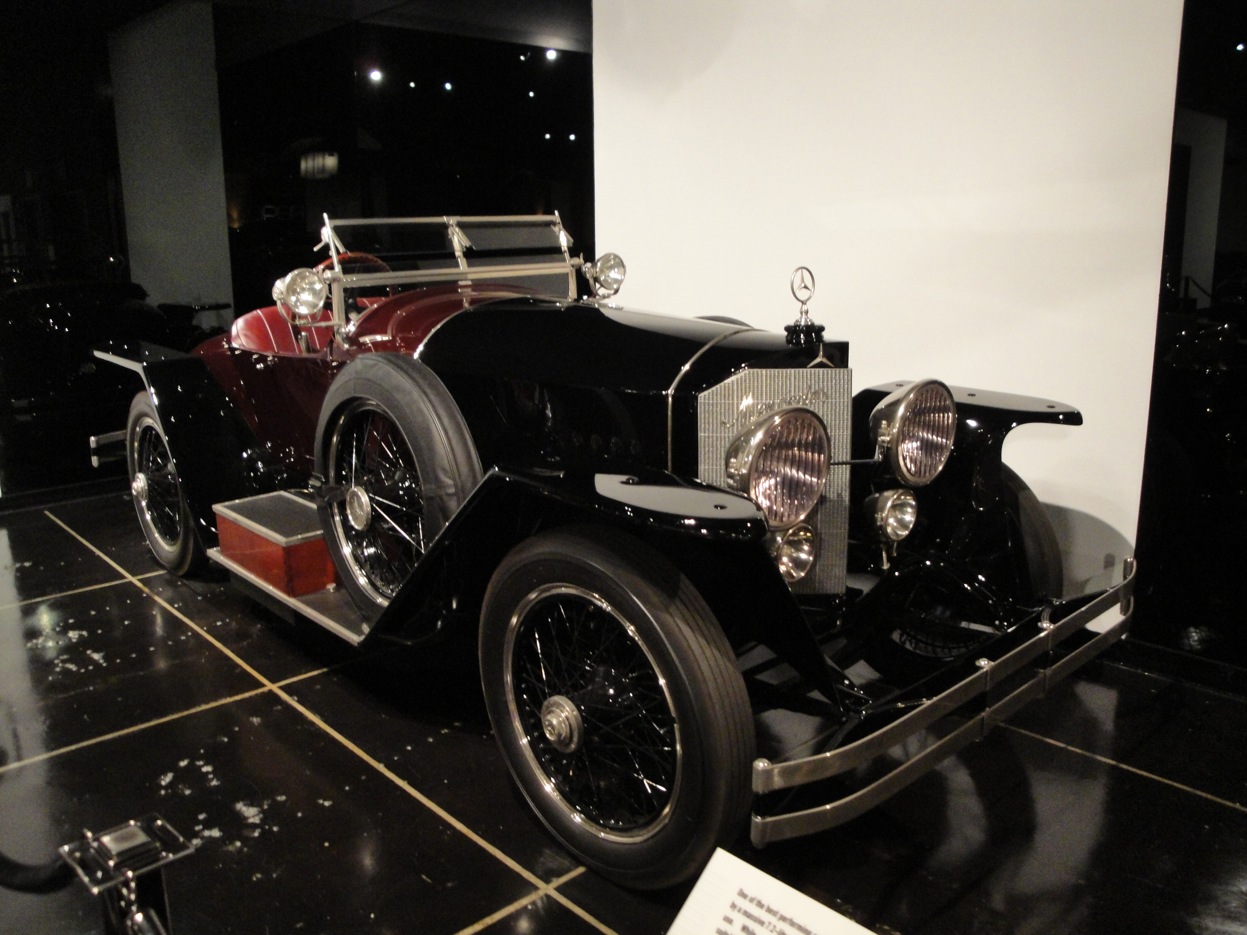 23 Mercedes 28/95 Targa Florio